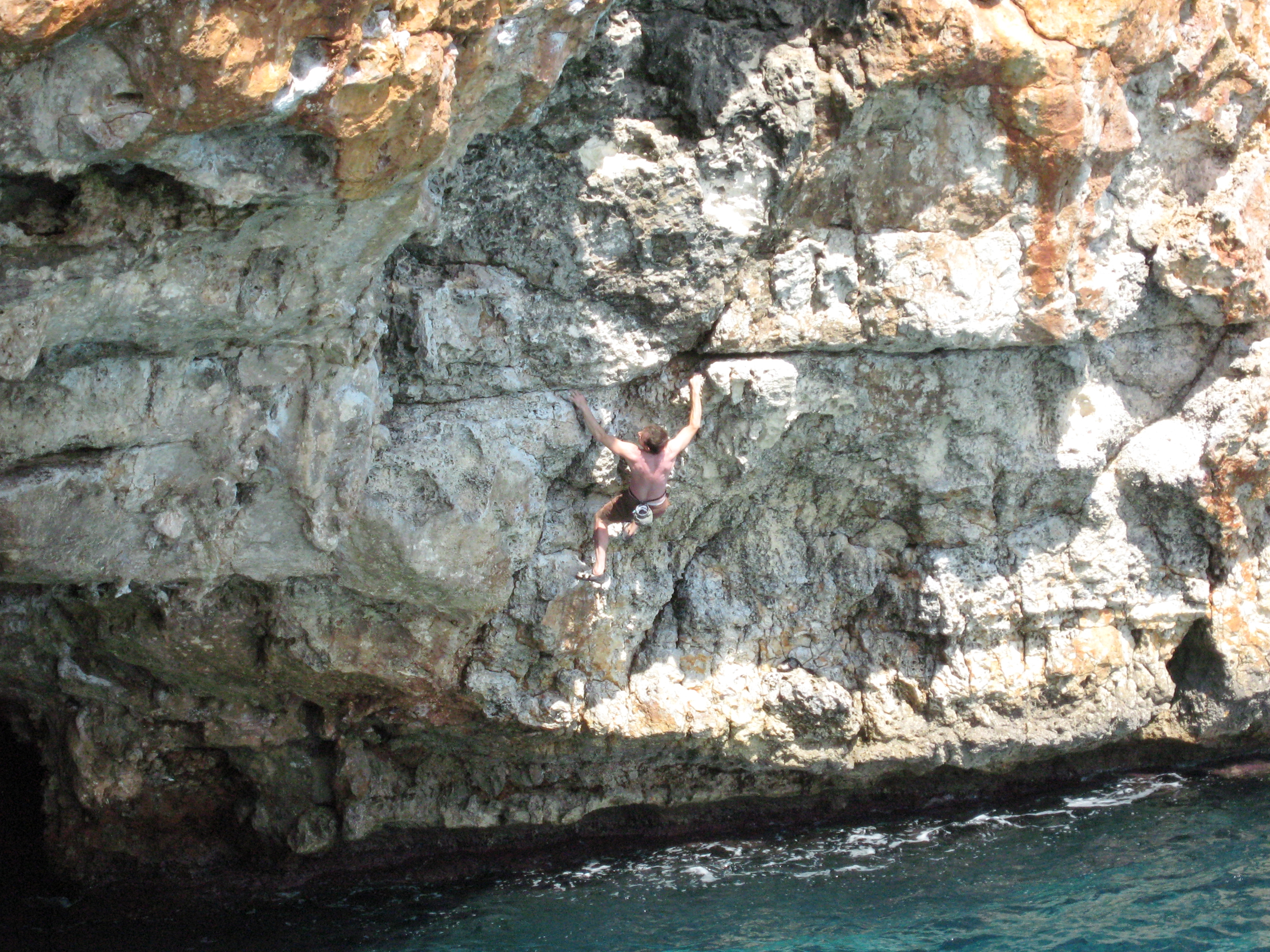 Freiklettern (Psicobloc / Deep Water Soloing) an der Steilküste der Cala Varques, Gemeinde Manacor, Mallorca, Spanien